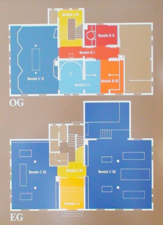 Urmensch-Museum Steinheim an der Murr, Badenwürttemberg - Plan der Ausstellungsräume